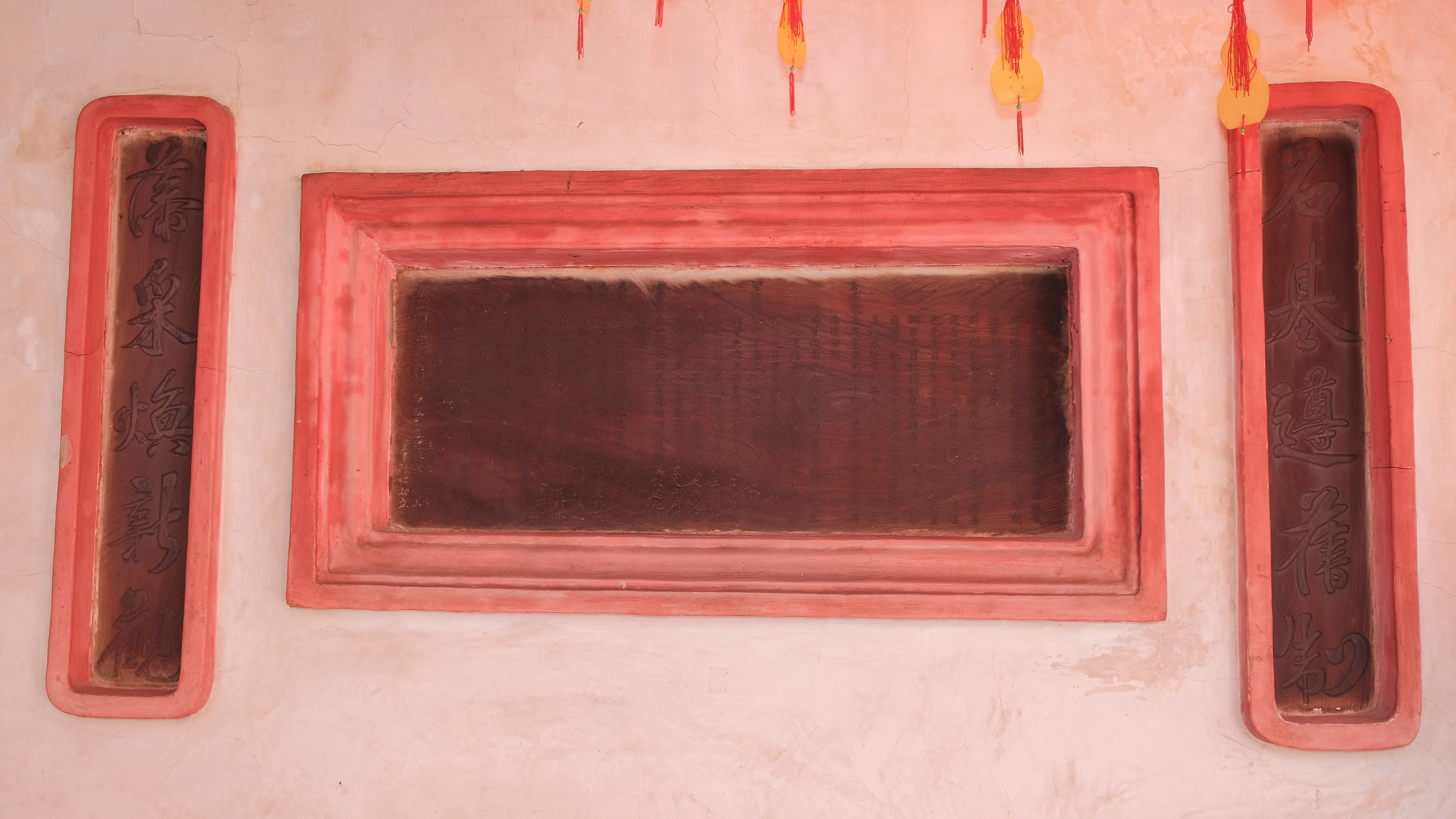 中文（台灣）: 2019 Xinzhuang Wusheng Temple 新莊武聖廟重興武廟碑同治七年(1868年)艋舺縣丞郭志緯撰 碑文 大哉夫子之神靈，其赫赫於天下久矣！豈獨淡之新庄然哉！ 新庄開闢歷今百有餘年，自乾隆二十五年間，董事胡焯獻等建立武廟一間於米市，此權輿託始之意也。春秋屢易，寒暑頻更，而當日之墻璧丹青不無剝落。迨道光元年，前分縣王會同紳士林平侯等鳩資董辦，因其舊址移圳填益，擴為三進；高玉峰施舍廟前之地為香燈之資，益巍巍乎稱巨觀云。 自是以來，街市大興，人民以庶幾為有名之區。而夫子之妥其靈者，又三十餘年。嗟乎！詎意有咸豐三年倏因分類，武廟遭燬，前之人民未幾而廖落矣！前之街市未幾而蕭條矣！噫嘻！分類之慘，何可勝言哉！ 緯於同治元年正月奉委署理新庄縣丞，肅瞻聖像，供奉於草屋之下；風雨飄淋，褻瀆孰甚！當諭紳耆捐資興脩，正在會議，不意彰屬戴逆茲事；淡廳秋公往剿遇害，大甲被陷，竄擾淡北、土匪蜂起。當斯時也，內有窺伺之賊，外無救援之兵，竟匪首楊貢率眾入署，意圖不軌，殆哉岌岌乎！所賴神靈護庇，一呼而街民響應，楊貢伏誅、群醜散逃，地方肅靖。益夫子之默佑於淡疆，而淡疆之托福於夫子豈淺鮮哉！ 夫有事求禱於廟中，無事置之於度外；於理未順，於心奚安？用特首先捐廉以為之倡，並諭紳士高國瑞等董督其事，鳩工庀材；木從其堅、製從其僕，經之營之，於焉成之。 愿賴紳民人等樂業安居、和鄉睦里，勿以微嫌而習釁、勿以細故而生端，體君子有教無類之心、奉夫子俎豆馨香之報。庶幾神庥滋至，庇四境以相安；廟貌長存，歷千秋而不朽。是則緯之所厚望也夫！ 同治柒年陽月，署理新庄縣丞郭志緯撰、生員曾嵩年書、董事陳福助立。